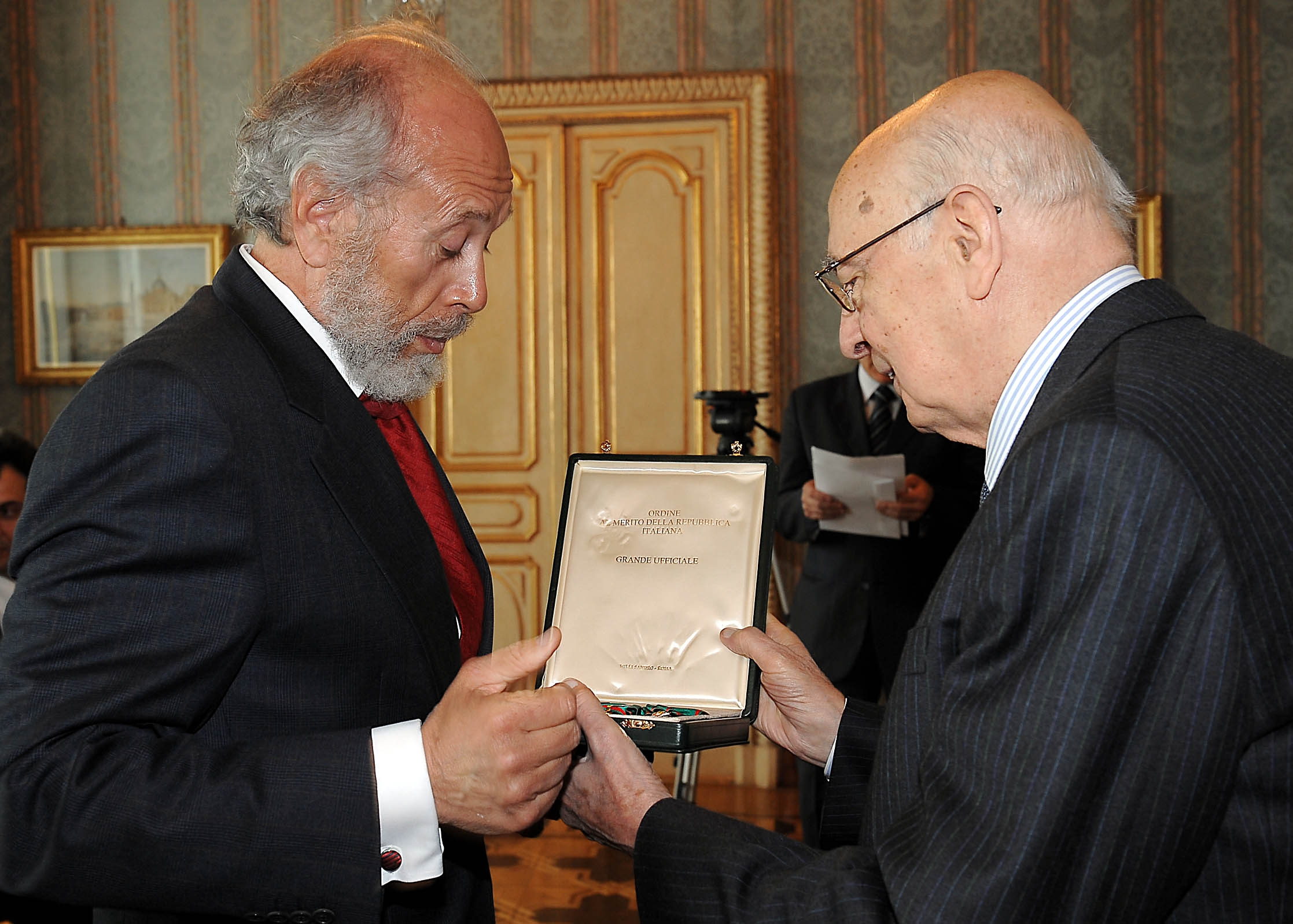 Conferimento dell'onorificenza al merito della Repubblica a Giorgio Sacerdoti su proposta di Napolitano